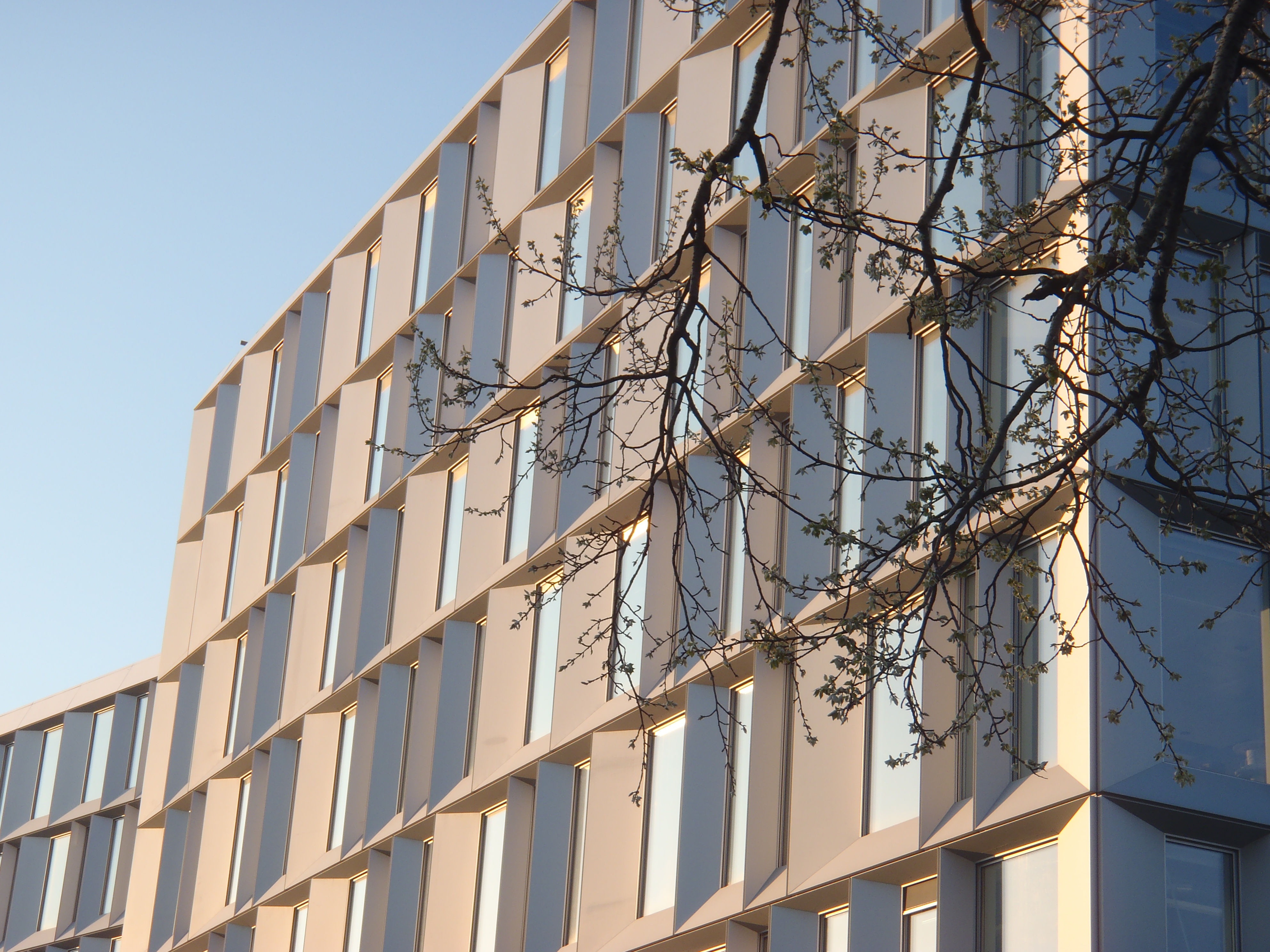 Kongens Lyngby, kontorbygning, kanalvej, fra sydøst mod nordvest.